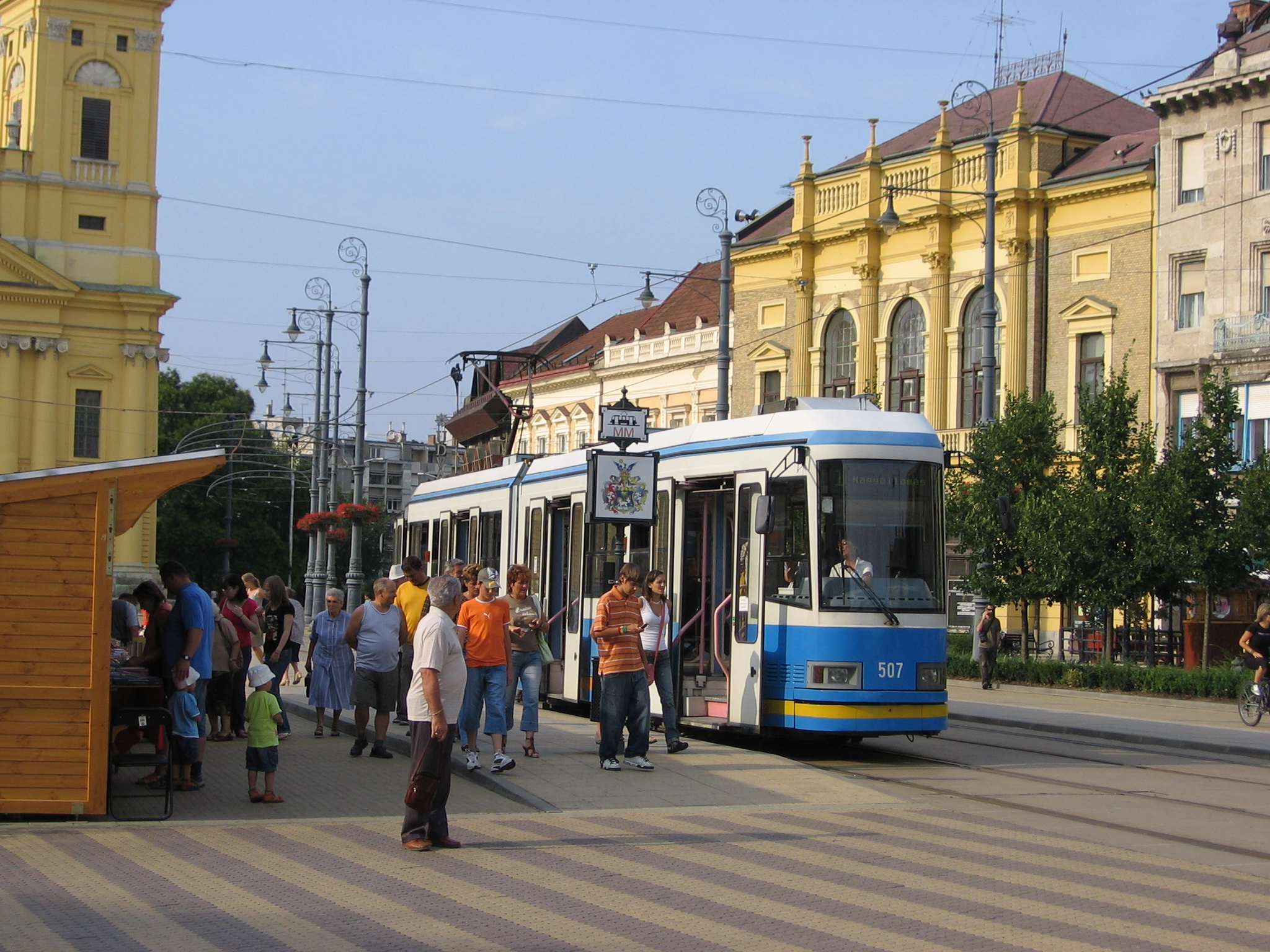 Tram stop at Piac ut in Debrecen Przystanek tramwajowy na Piac út w Debreczynie